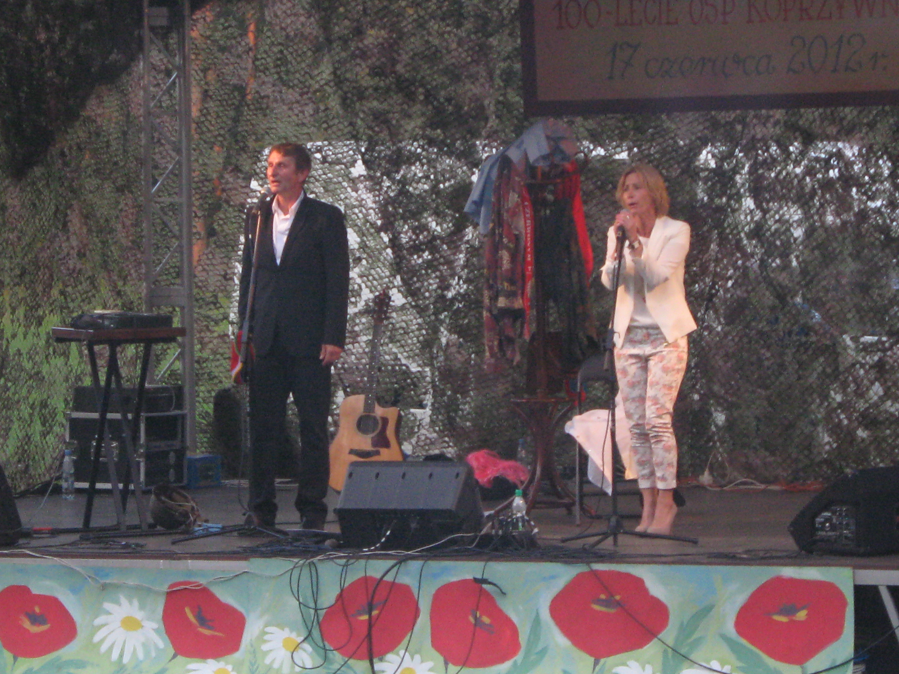 Andrzej Janeczko i Maja Piwońska (Trzeci Oddech Kaczuchy) podczas występu w Koprzywnicy (2012).